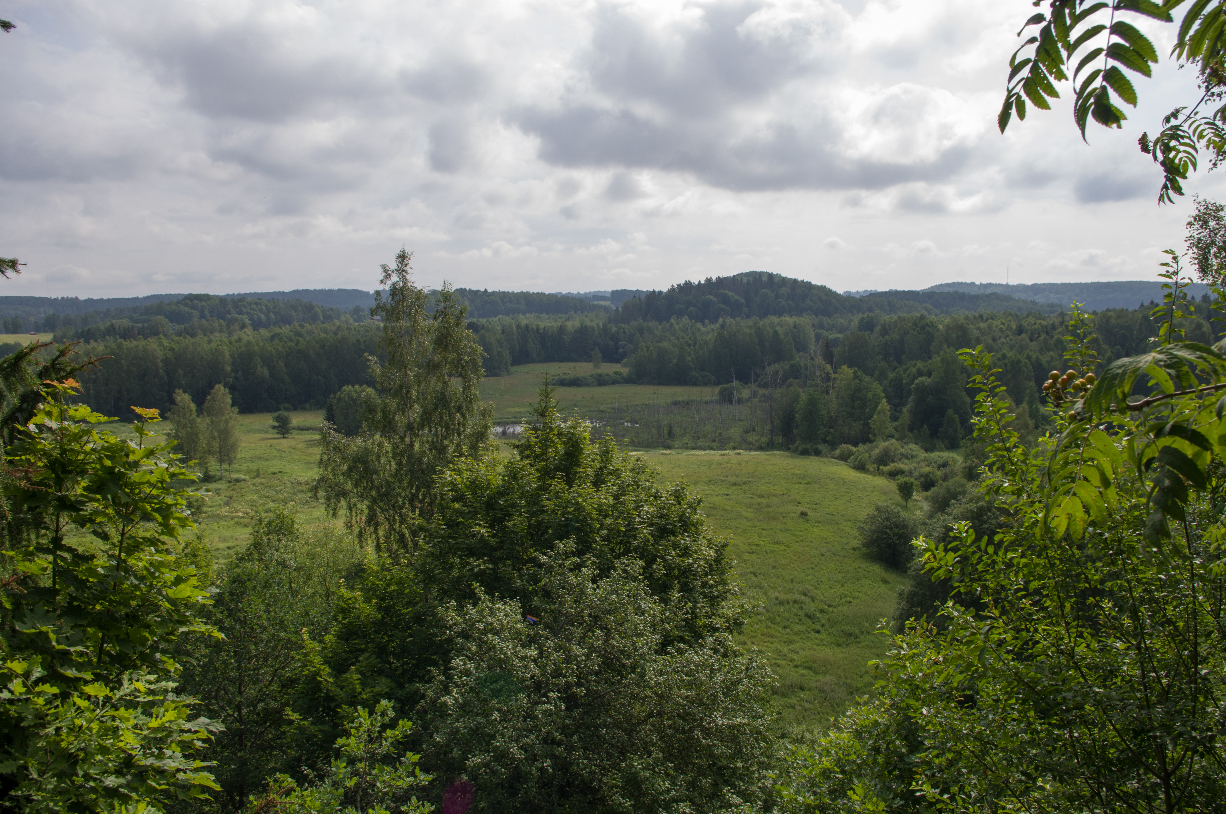 Otepää